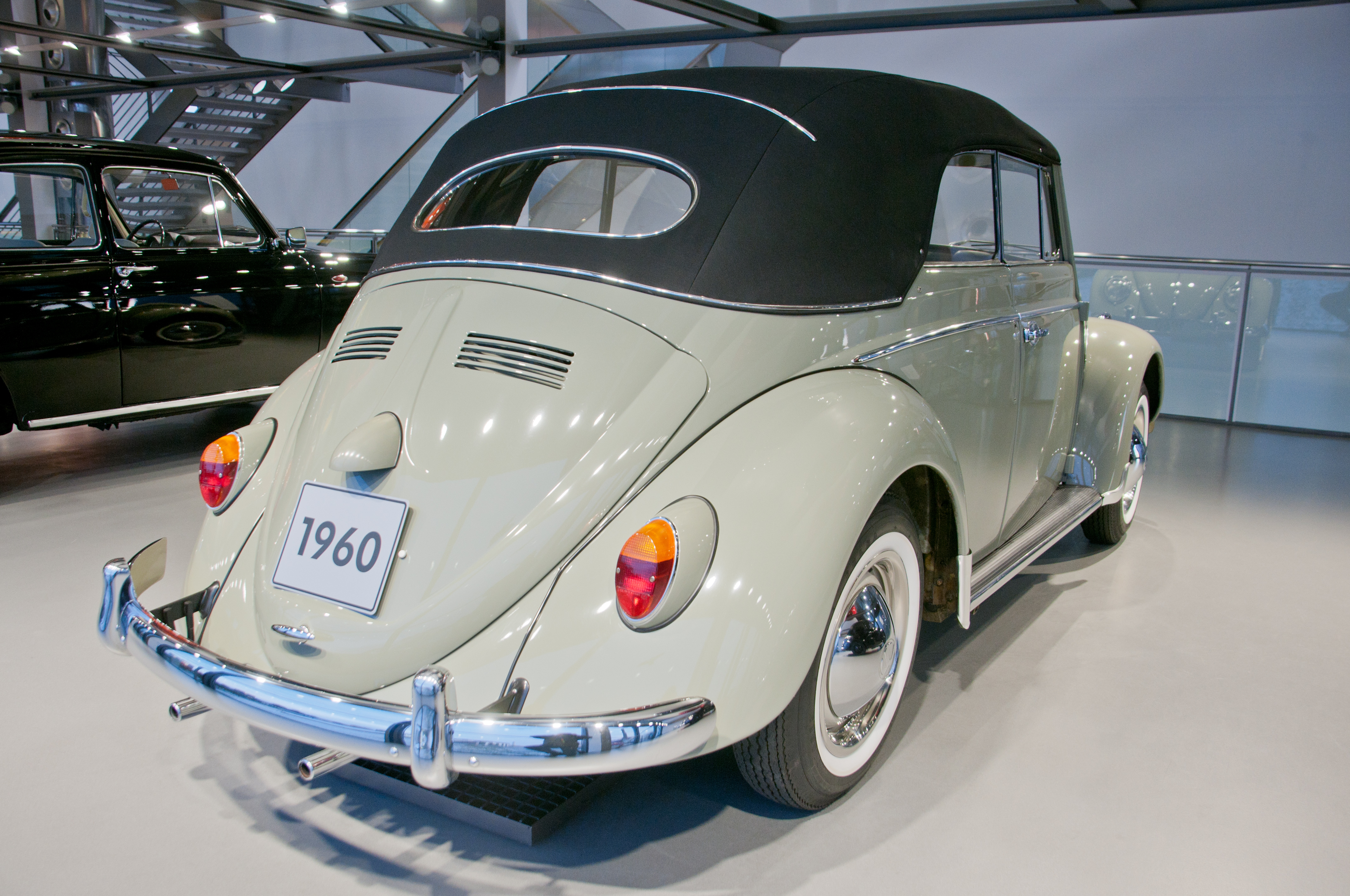 Autostadt Wolfsburg